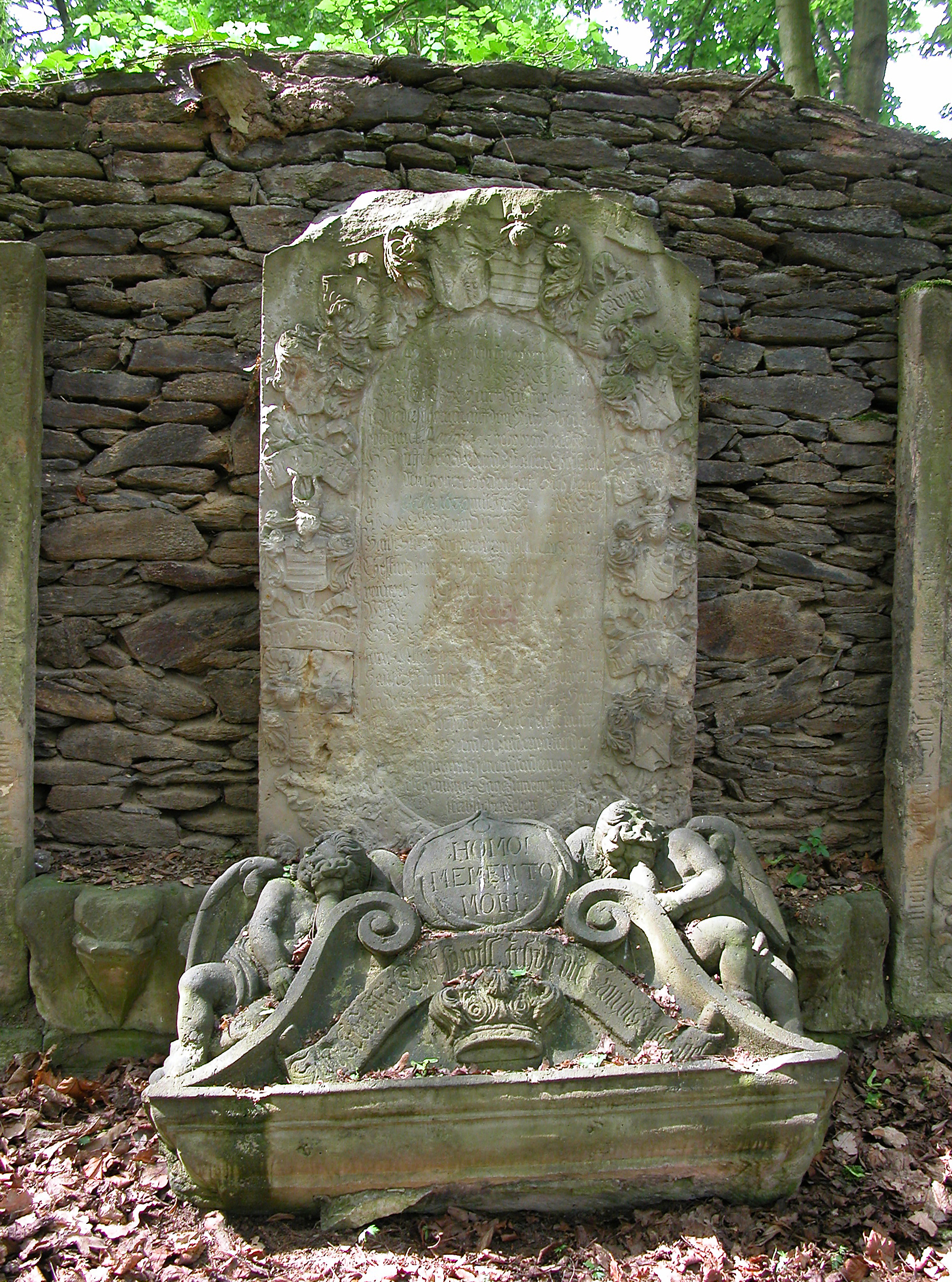 23.05.2009 09633 Krummenhennersdorf (Halsbrücke), Hofberg 1-5: Rittergut. Epitaph an der Schloßparkmauer. [DSCN37614.TIF]20090523120DR.JPG(c)Blobelt